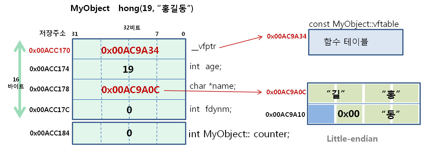 C++ 객체 메모리 구조 MyObject 예